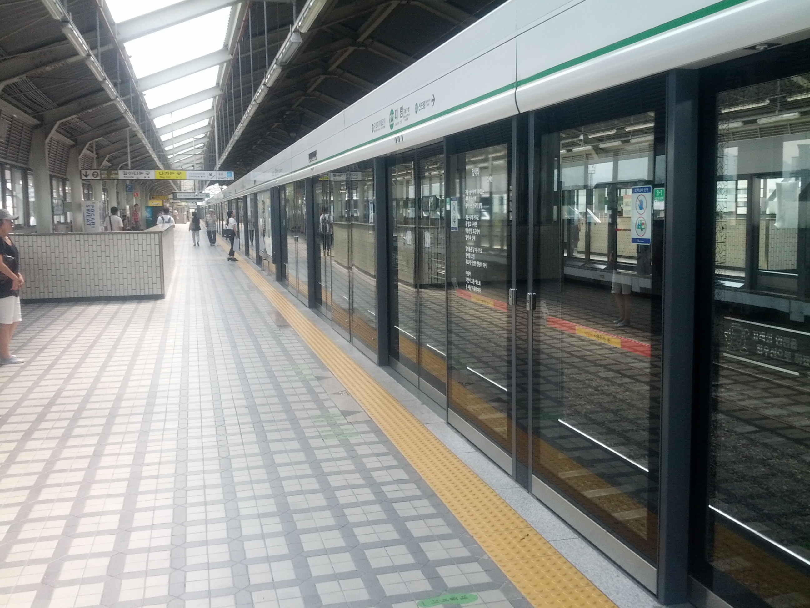 2호선 대림역 승강장